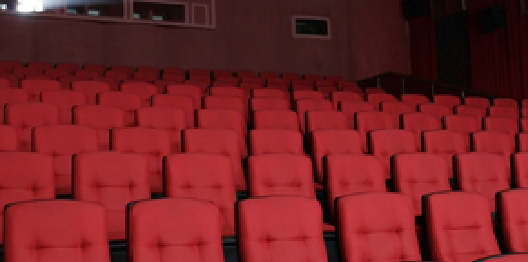 Interior da sala do Cine Ritz Divinópolis